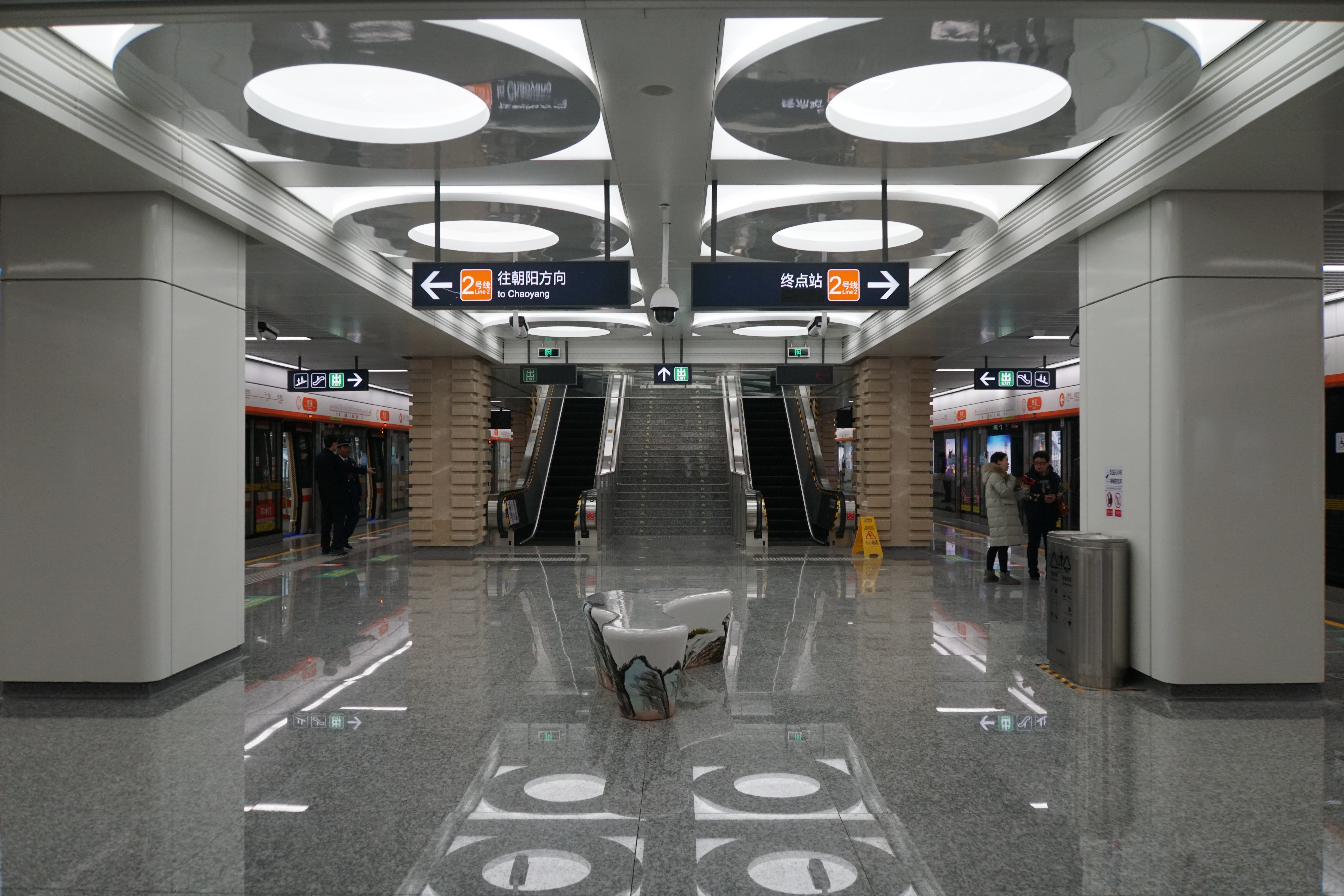 良渚站站台